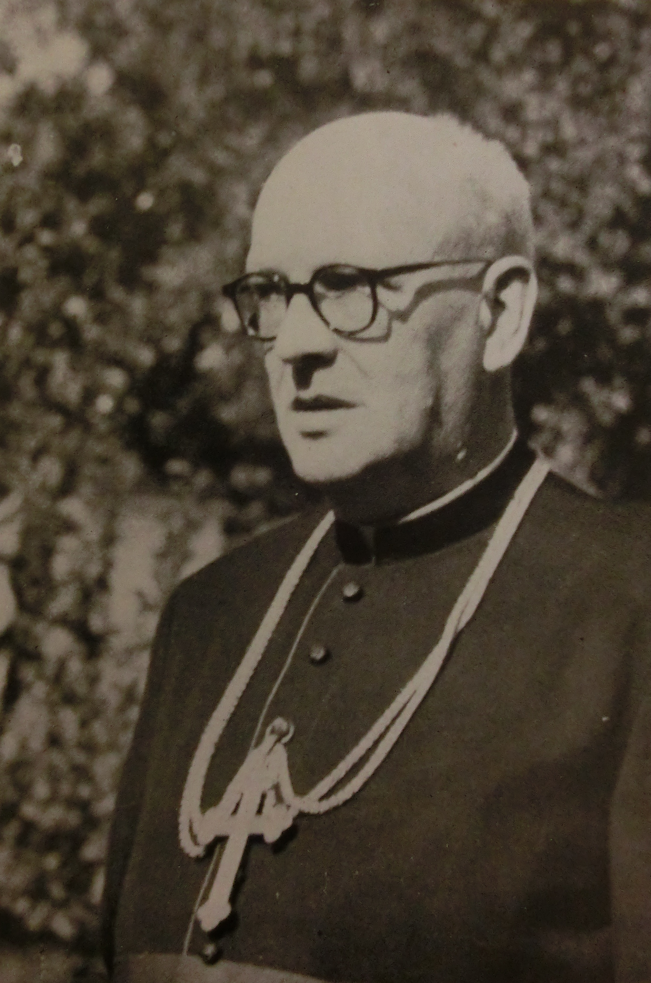 probošt litoměřické kapituly od 12. července 1951